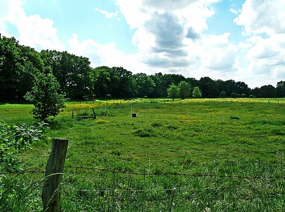 Weideflächen im Naturschutzgebiet „Stellmoorer Tunneltal“, Hamburg